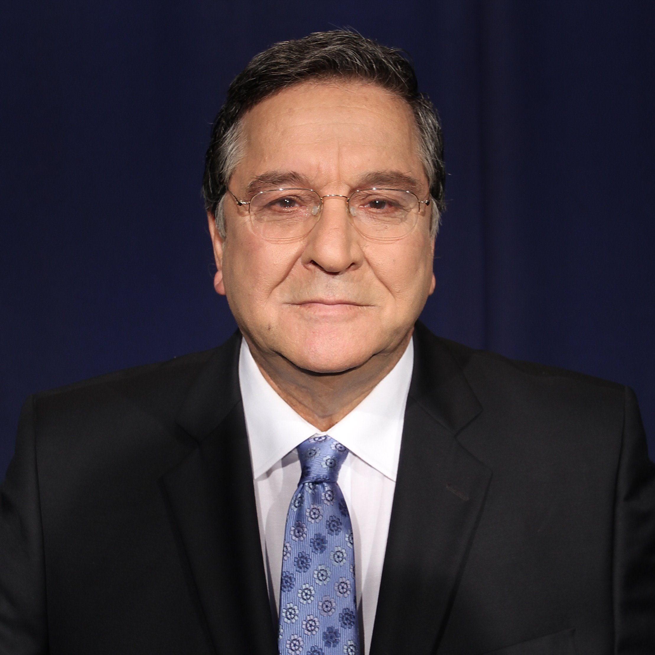 יעקב אחימאיר